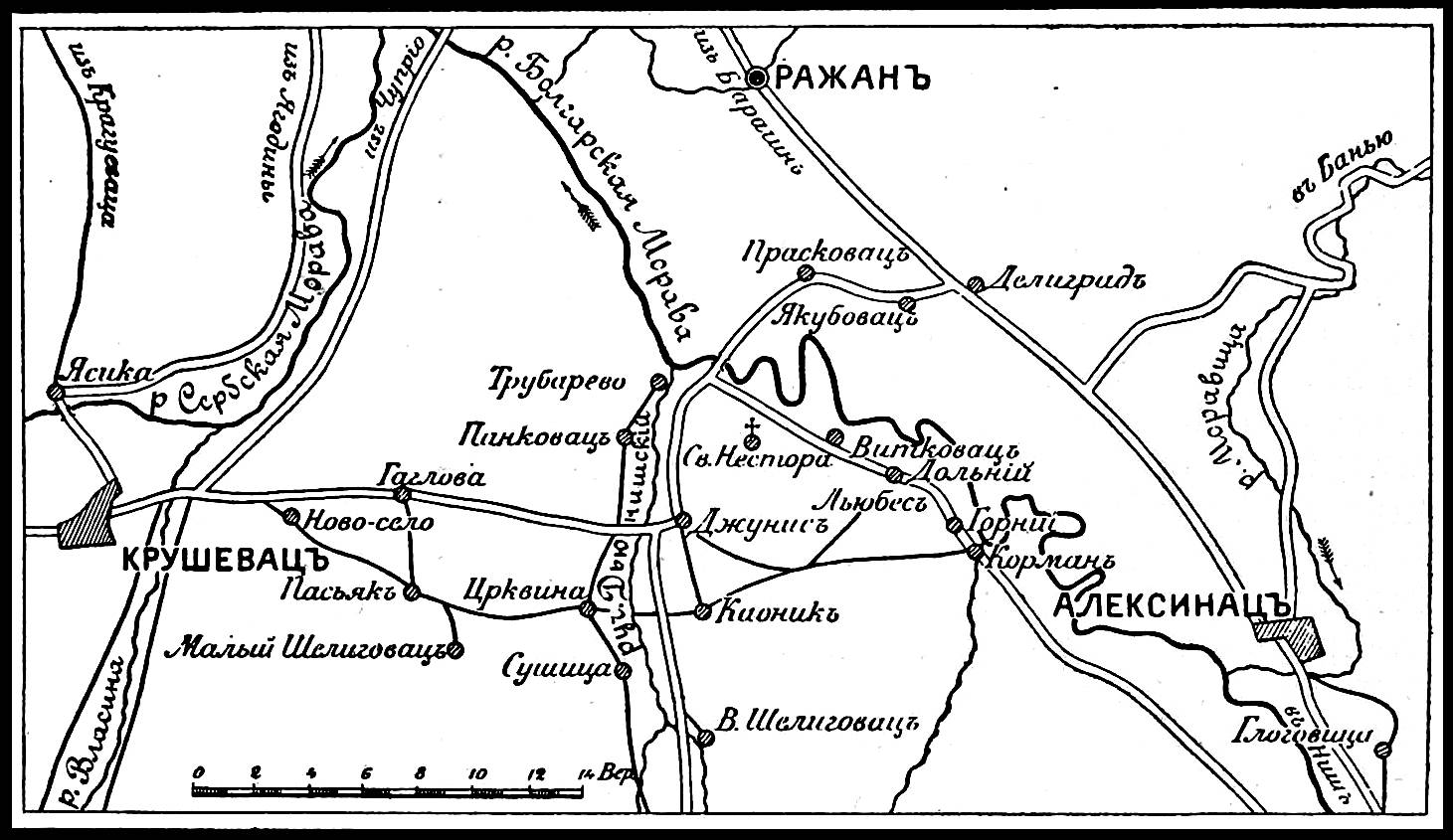 Это изображение было использовано для иллюстрирования статьи «Джюнис (Джунис, Дьюниш)» опубликованной в девятом томе «Военной энциклопедии», который был издан книгоиздательским товариществом И. Д. Сытина в 1912 году в столице Российской империи городе Санкт-Петербурге.